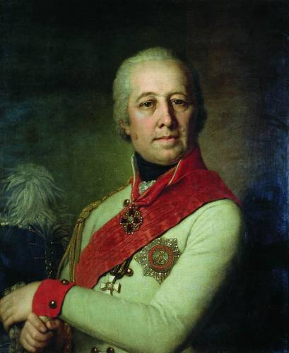 Иван Петрович Дунин (1752–?) – на военной службе числился с тринадцати лет. Генерал-майор (1789), генерал-поручик (1793). В 1794 командовал 1-й частью Главного корпуса в Польше, генерал-аншеф (1795). С воцарением Павла I – инспектор по кавалерии Екатеринославской и Таврической губерний (1796–1797), шеф Елисаветградского гусарского полка (1796–1798). Генерал от кавалерии (декабрь 1797). Женат был на М.Д.Норовой.